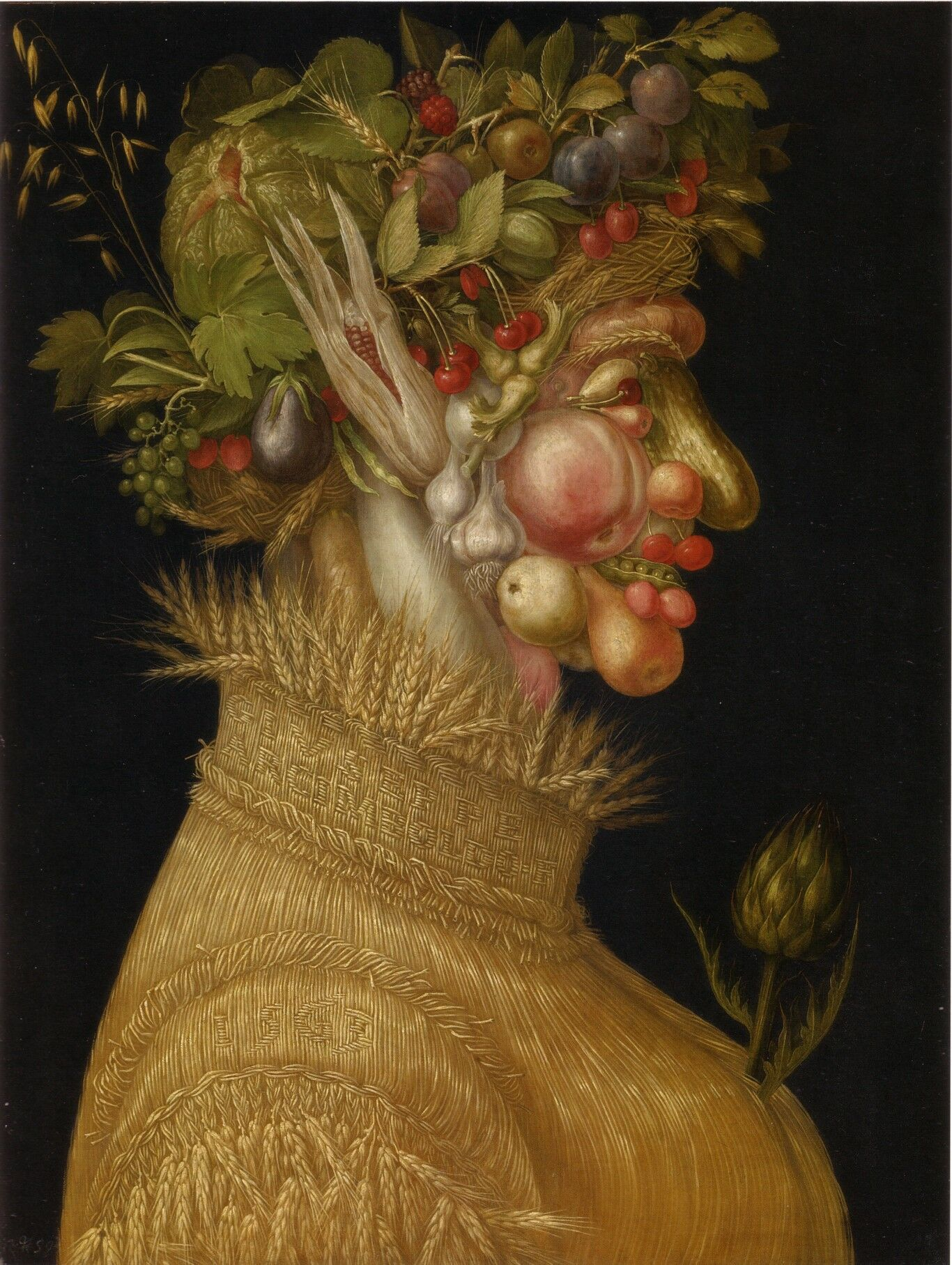 The Summerlabel QS:Len,"The Summer" label QS:Lde,"Der Sommer"